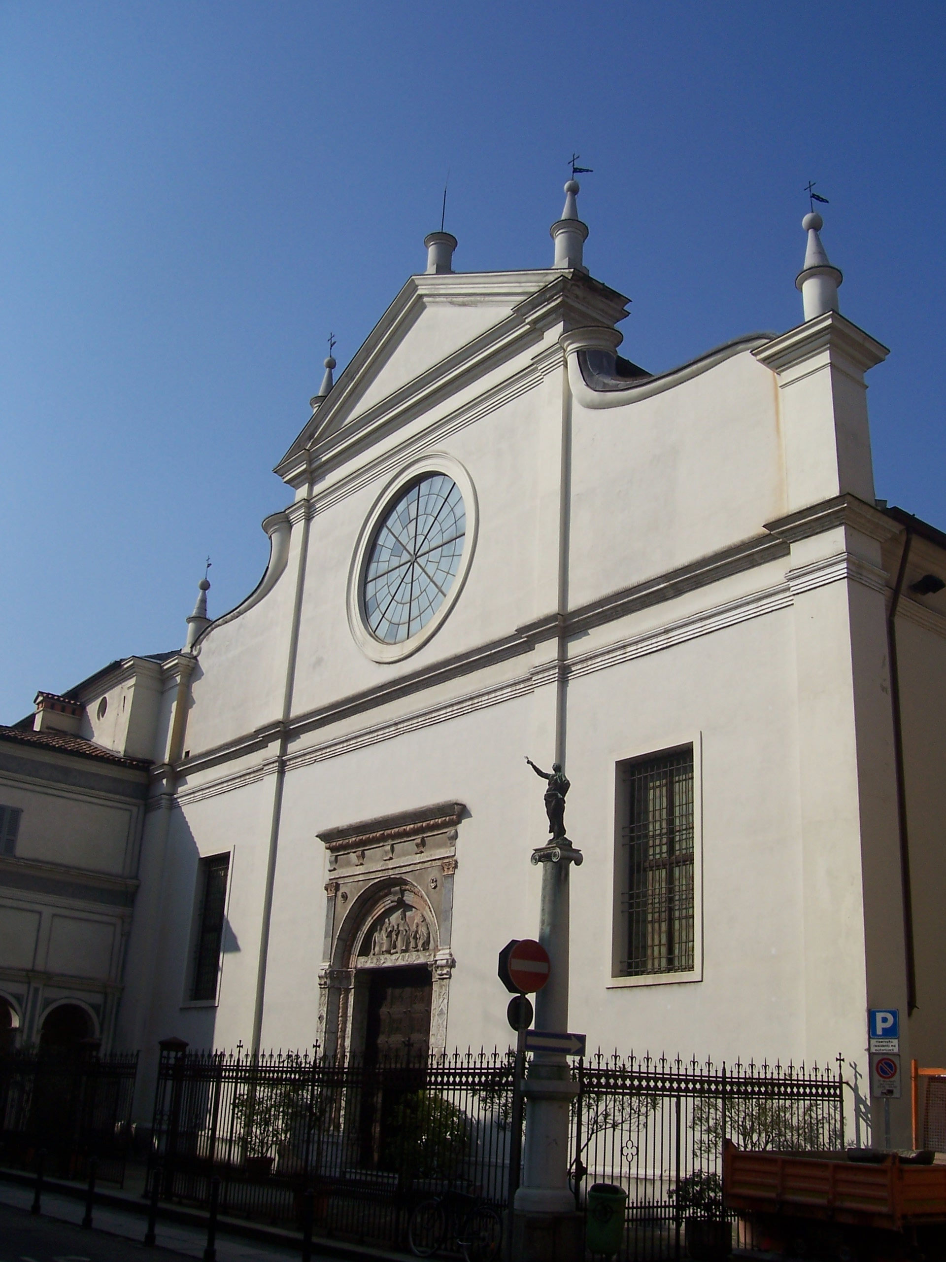 Santa maria delle grazie (brescia) facciata.jpg